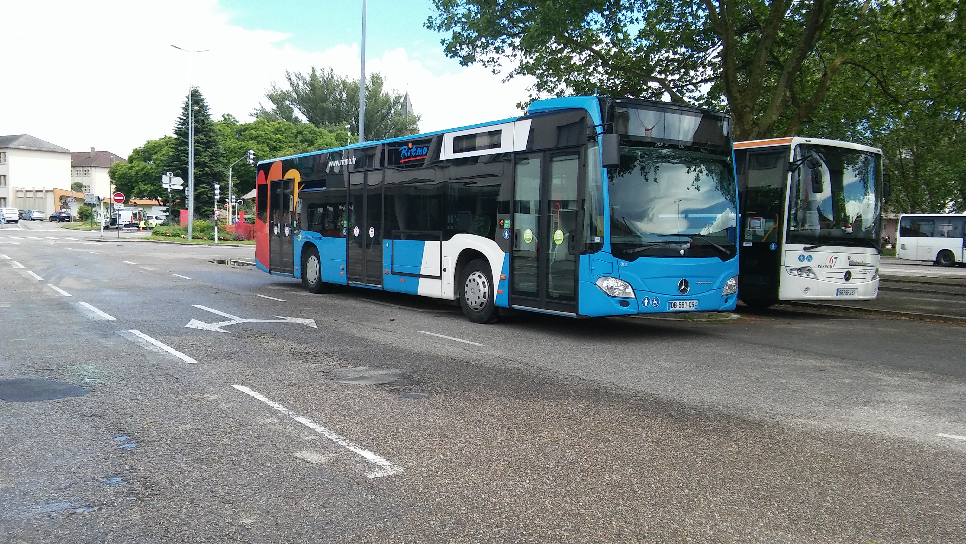 Mercedes-Benz Citaro à la gare de Haguenau en 2016